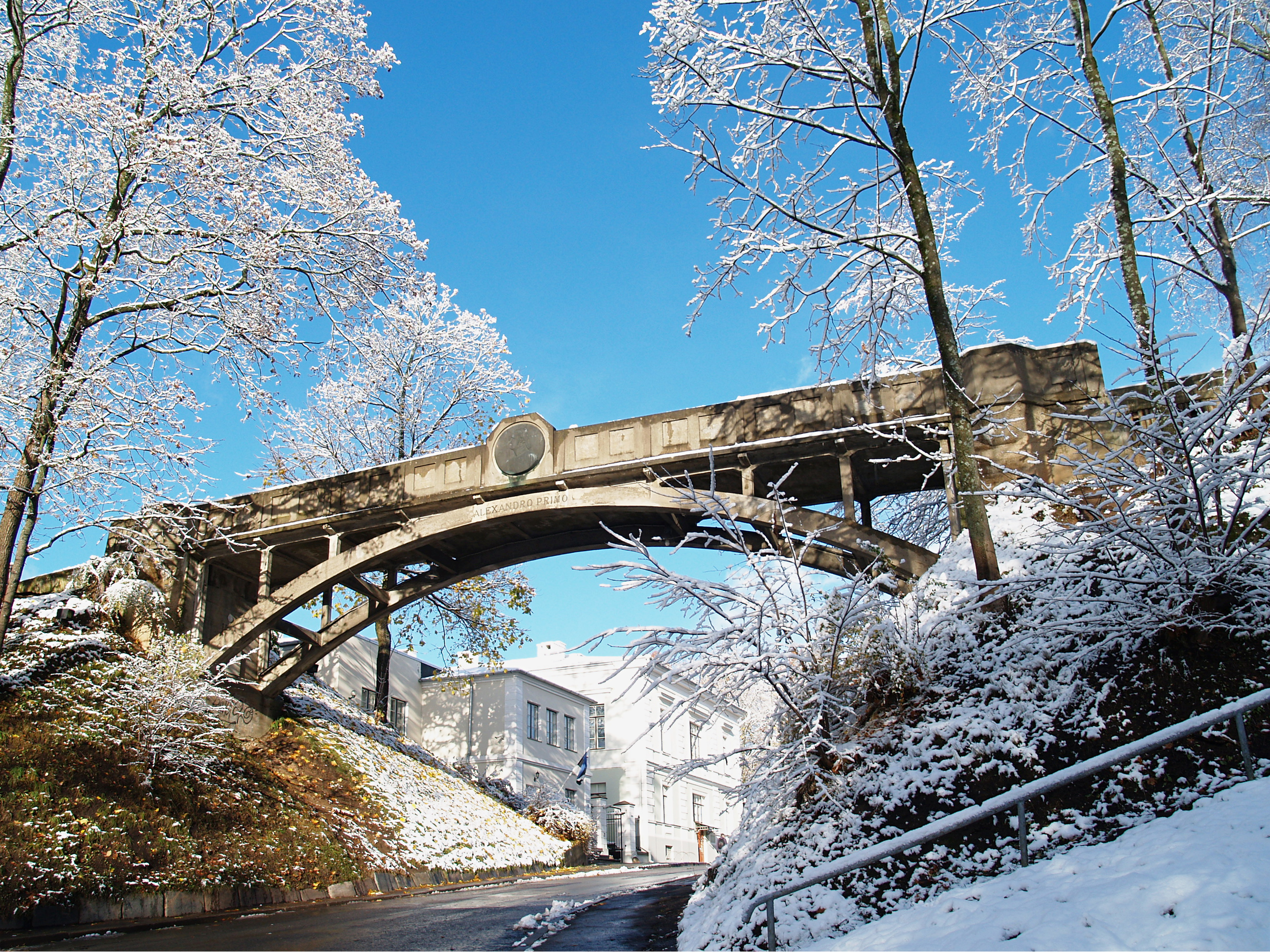 Kuradisild talvel